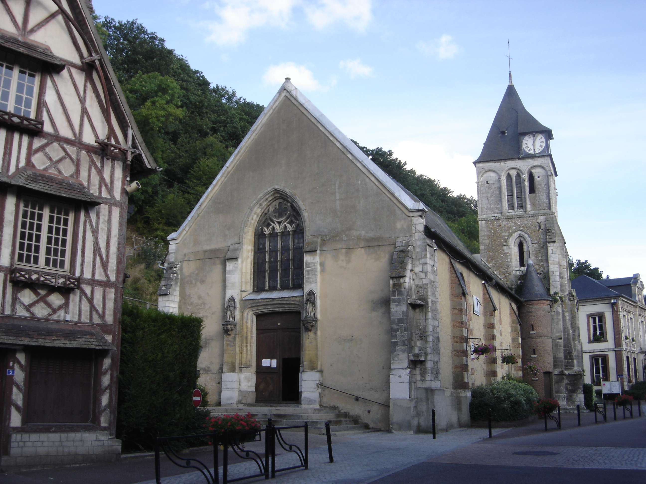 Eglise de Montfort-sur-Risle - Eure - France